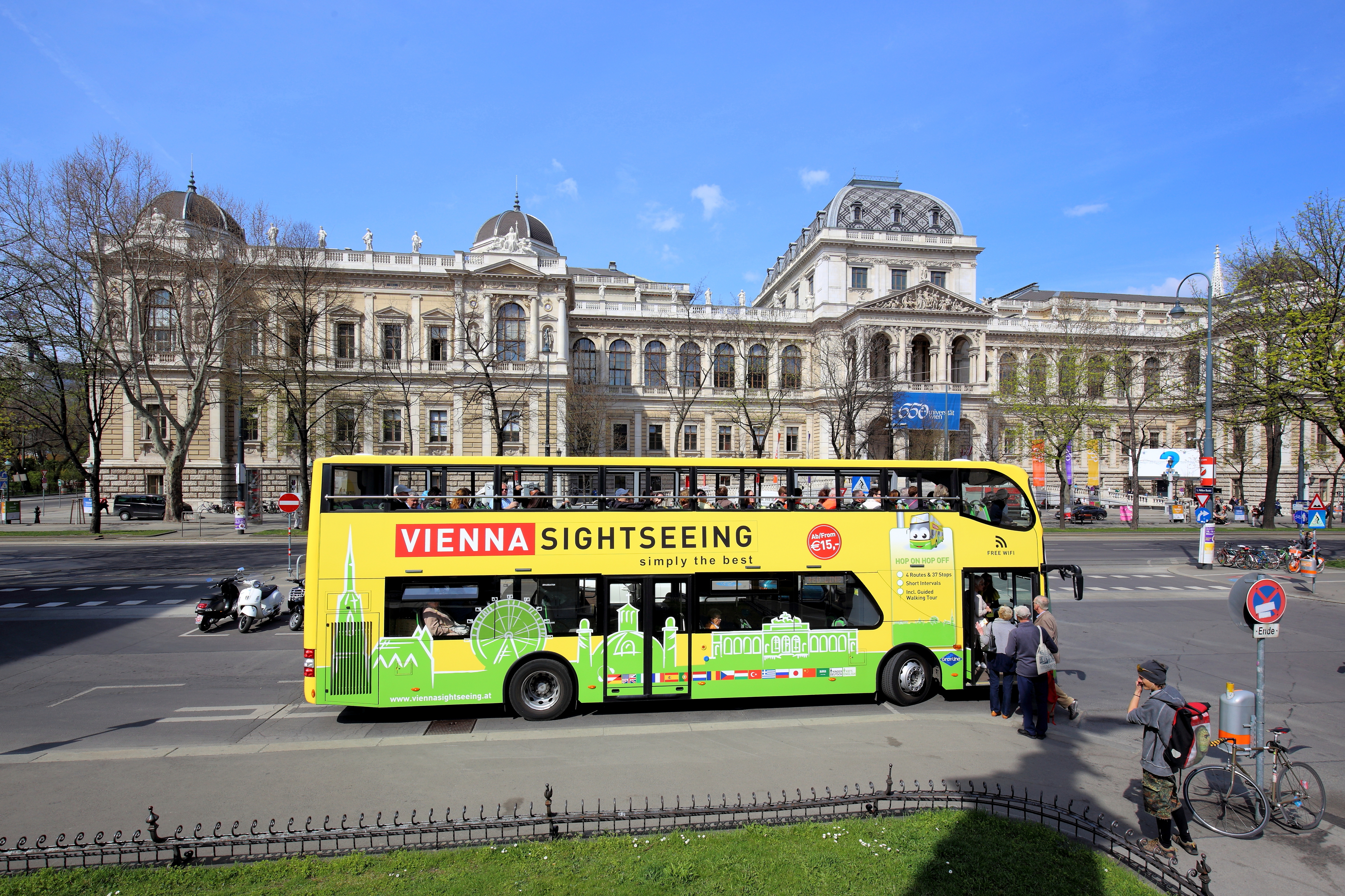 Im Vordergrund ein Sightseeing-Bus und dahinter des Hauptgebäudes der Universität Wien am Universitätsring in der österreichischen Bundeshaupstadt Wien. Das Universitätsgebäude wurde von 1877 bis 1884 nach Plänen des Architekten Heinrich von Ferstel errichtet.